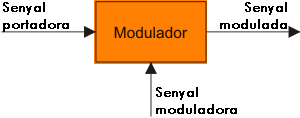 cacuna